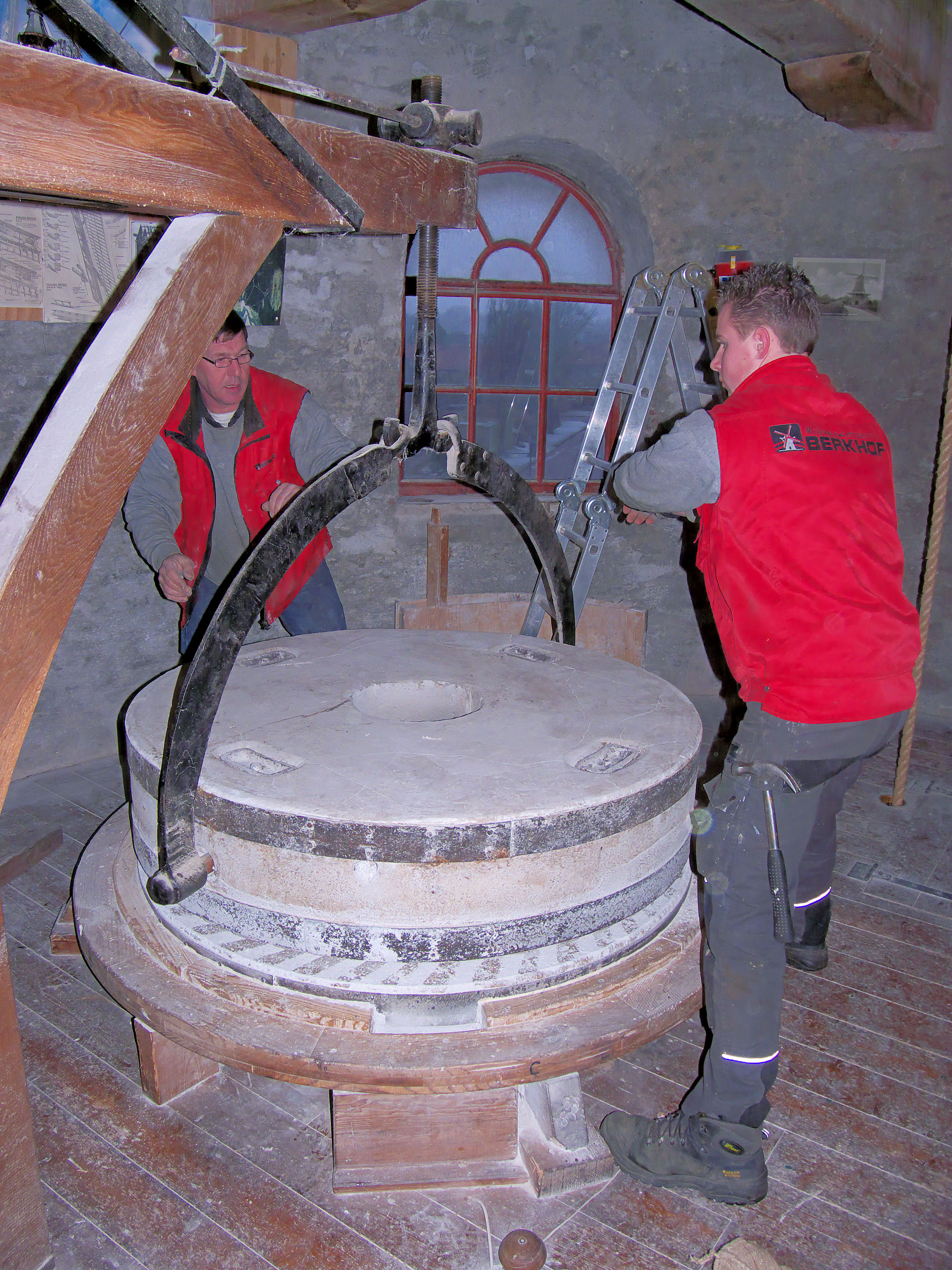 Molen De Hoop, Garderen, openleggen maalkoppel